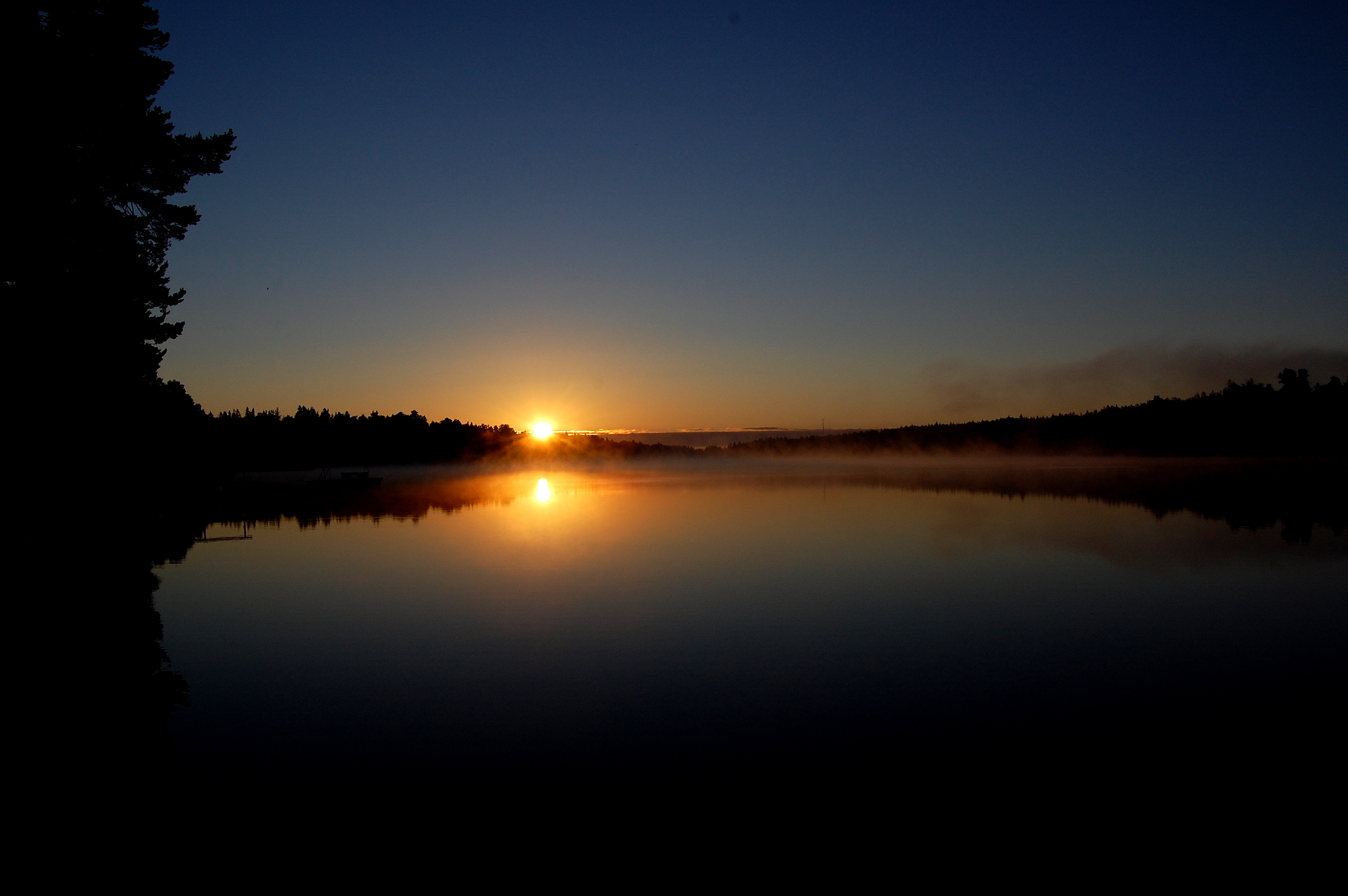 Det här är en bild tagen ut över sjön Trehörningen i Uppsala.